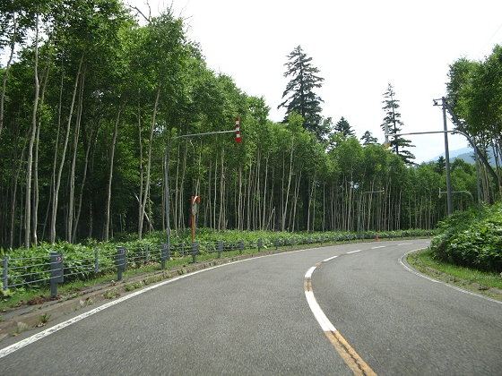 国道333号北見峠